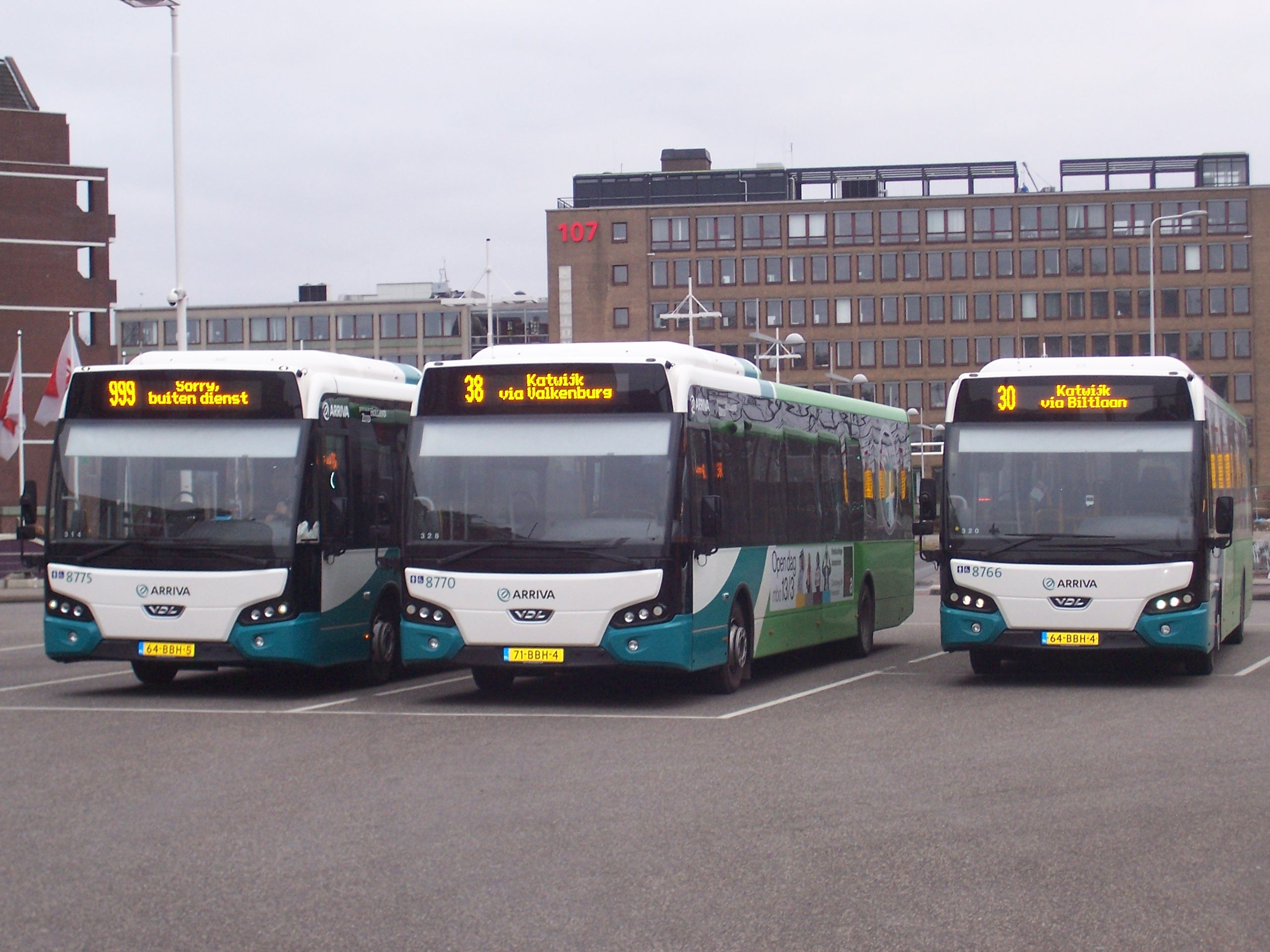 3 bussen op een rij, waaronder lijn 38 en 30 naar Katwijk.